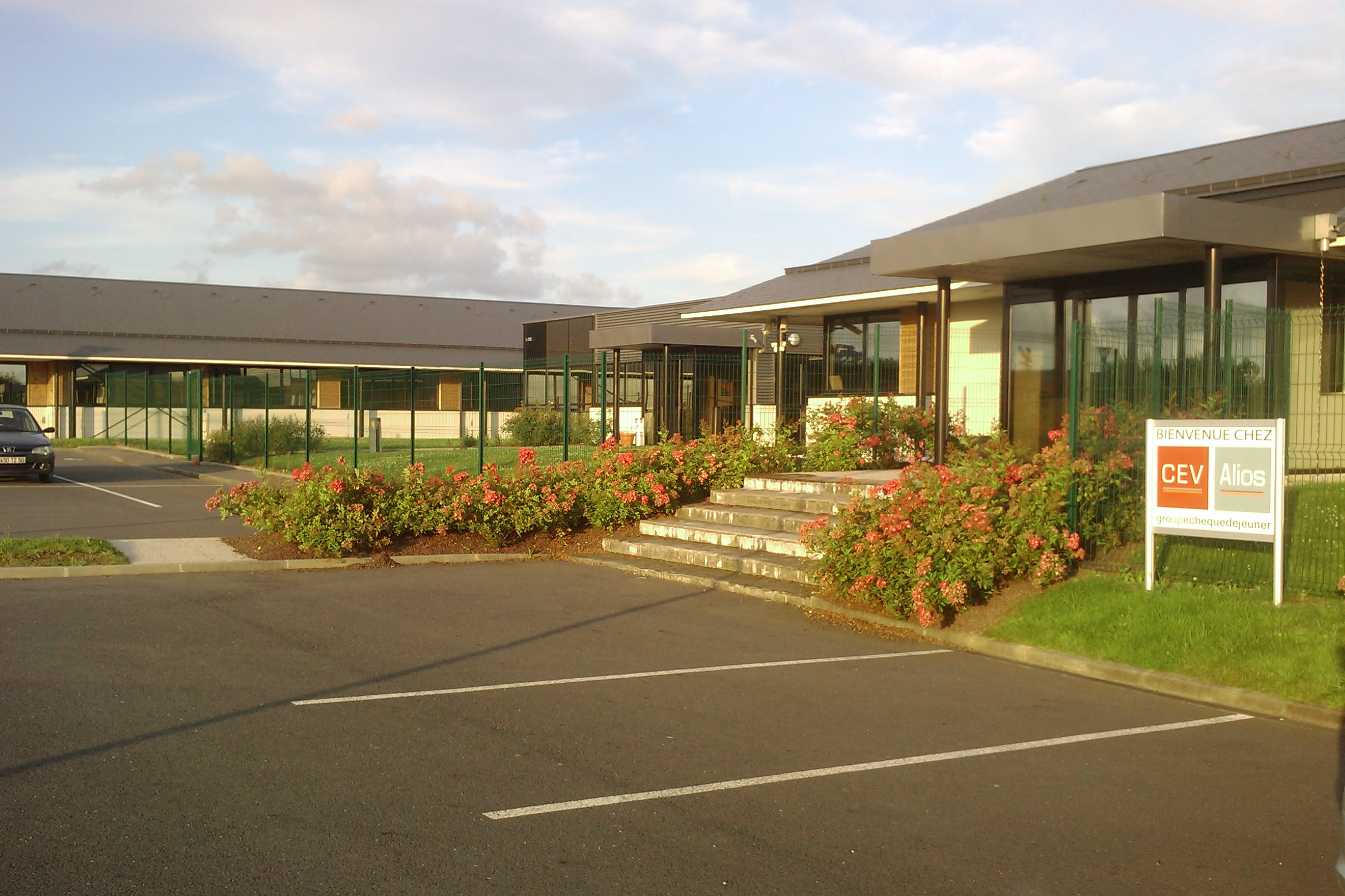 Bâtiment de l'entreprise CEV Group-Alios